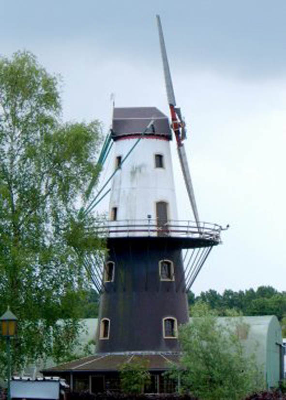 terluchtestraat achter nr 36